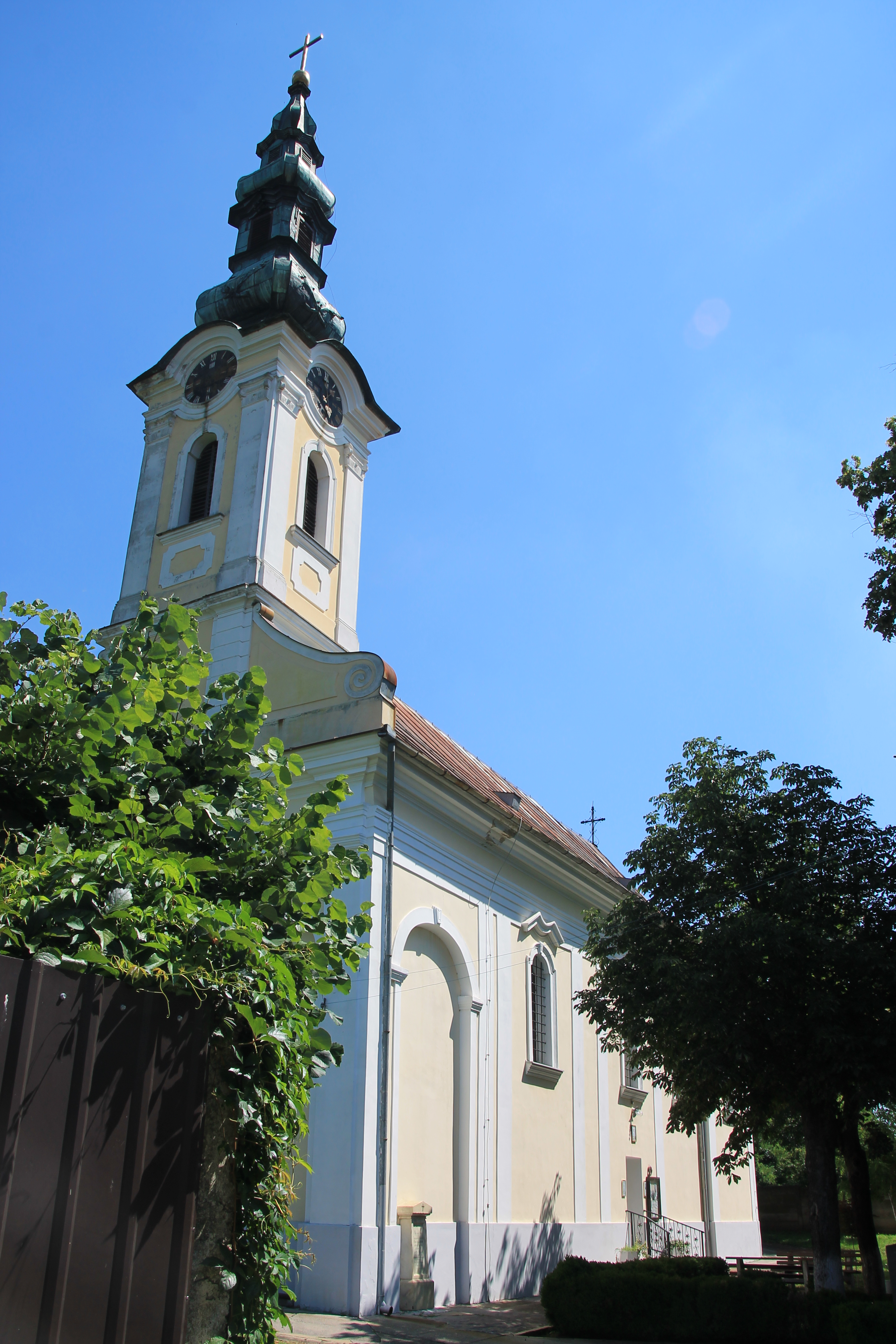 Srpska pravoslavna crkva (Bela Crkva)